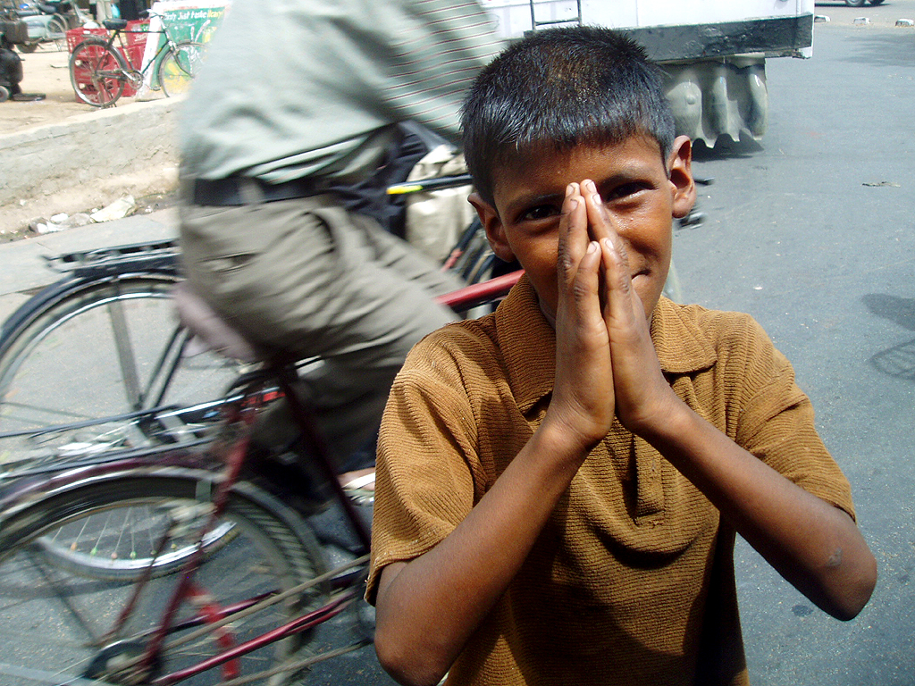 Boy begging in Agra